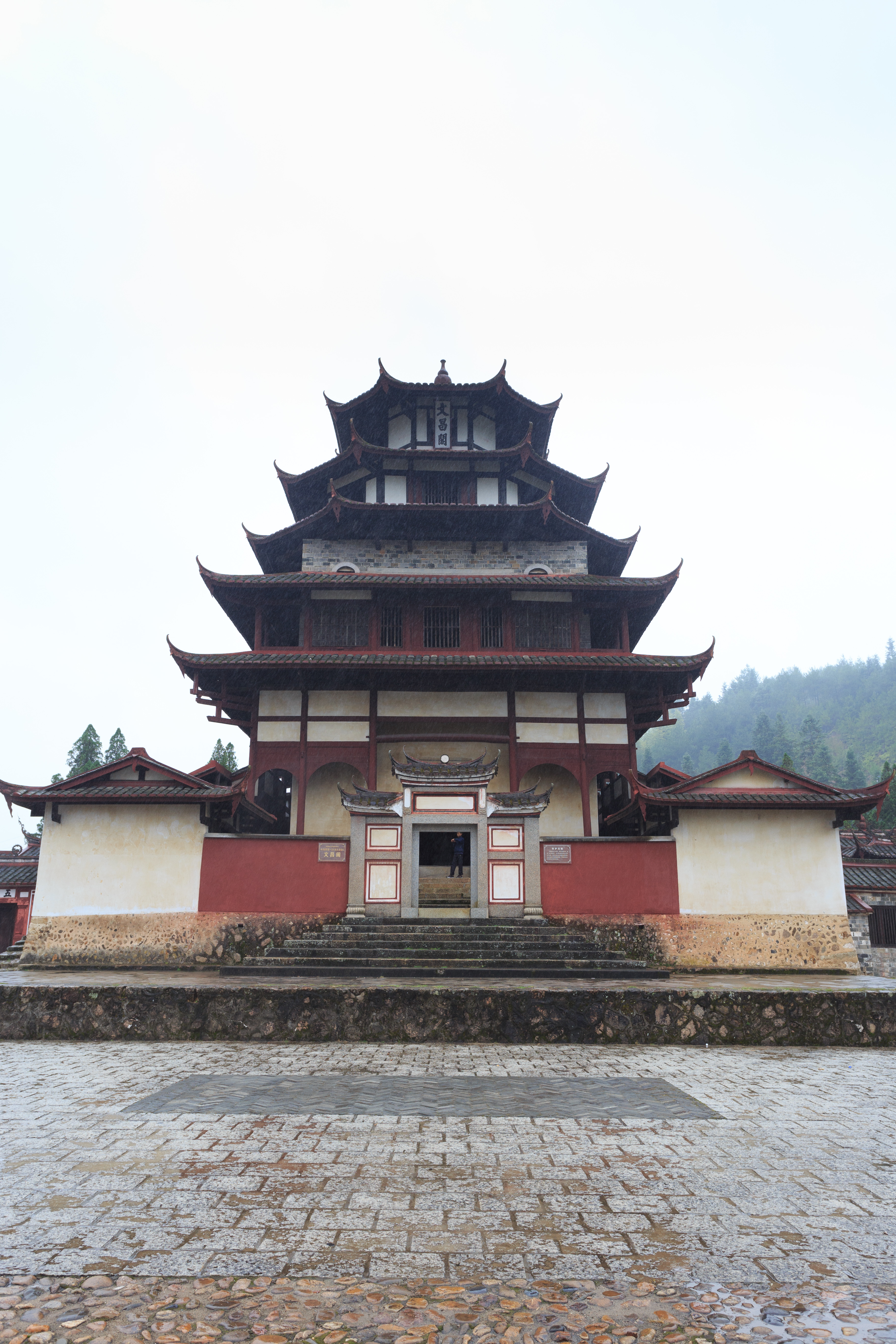 福建省上杭县县蛟洋乡蛟洋村文昌阁—— 正面